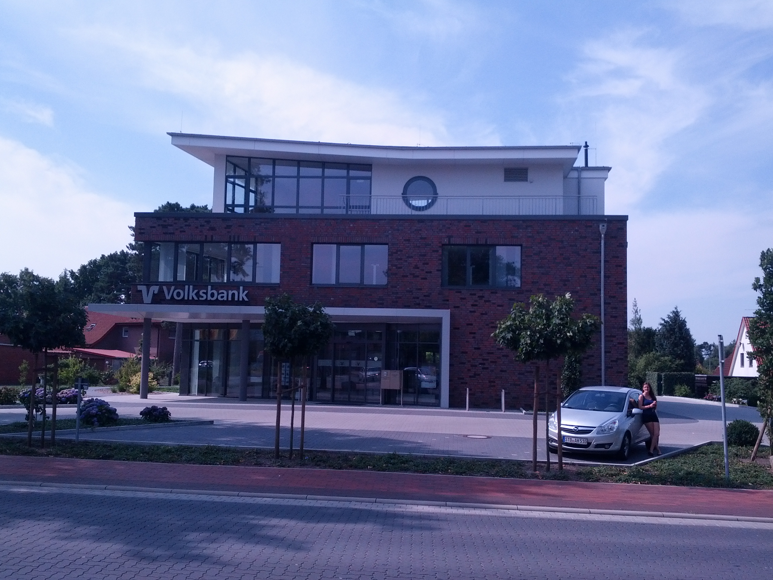 Front von de Volksbank in Hemmoor 2014